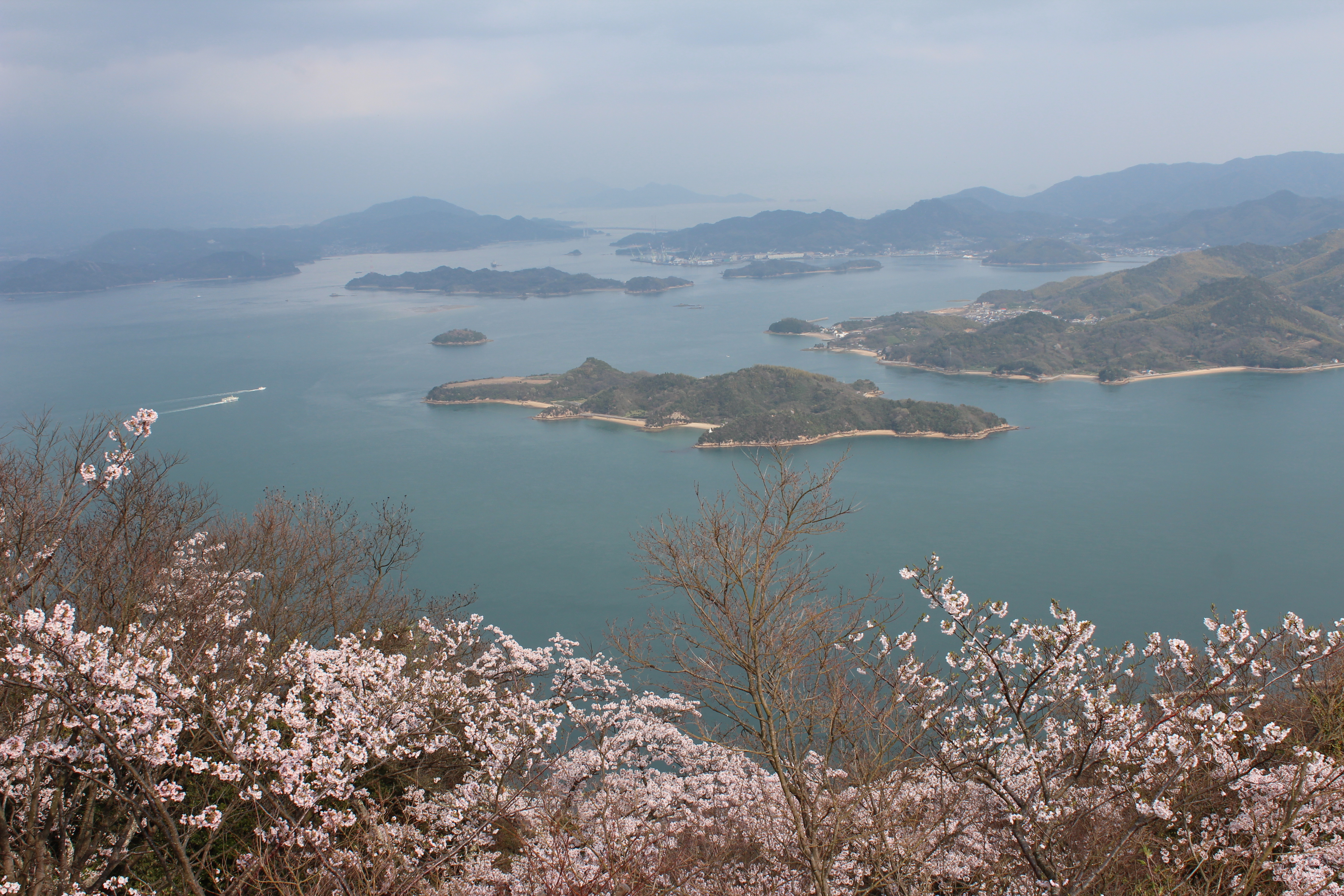 竜王山山頂の桜と多島美